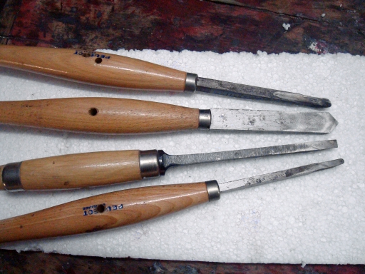 Gouges pour tournage sur tor à bois